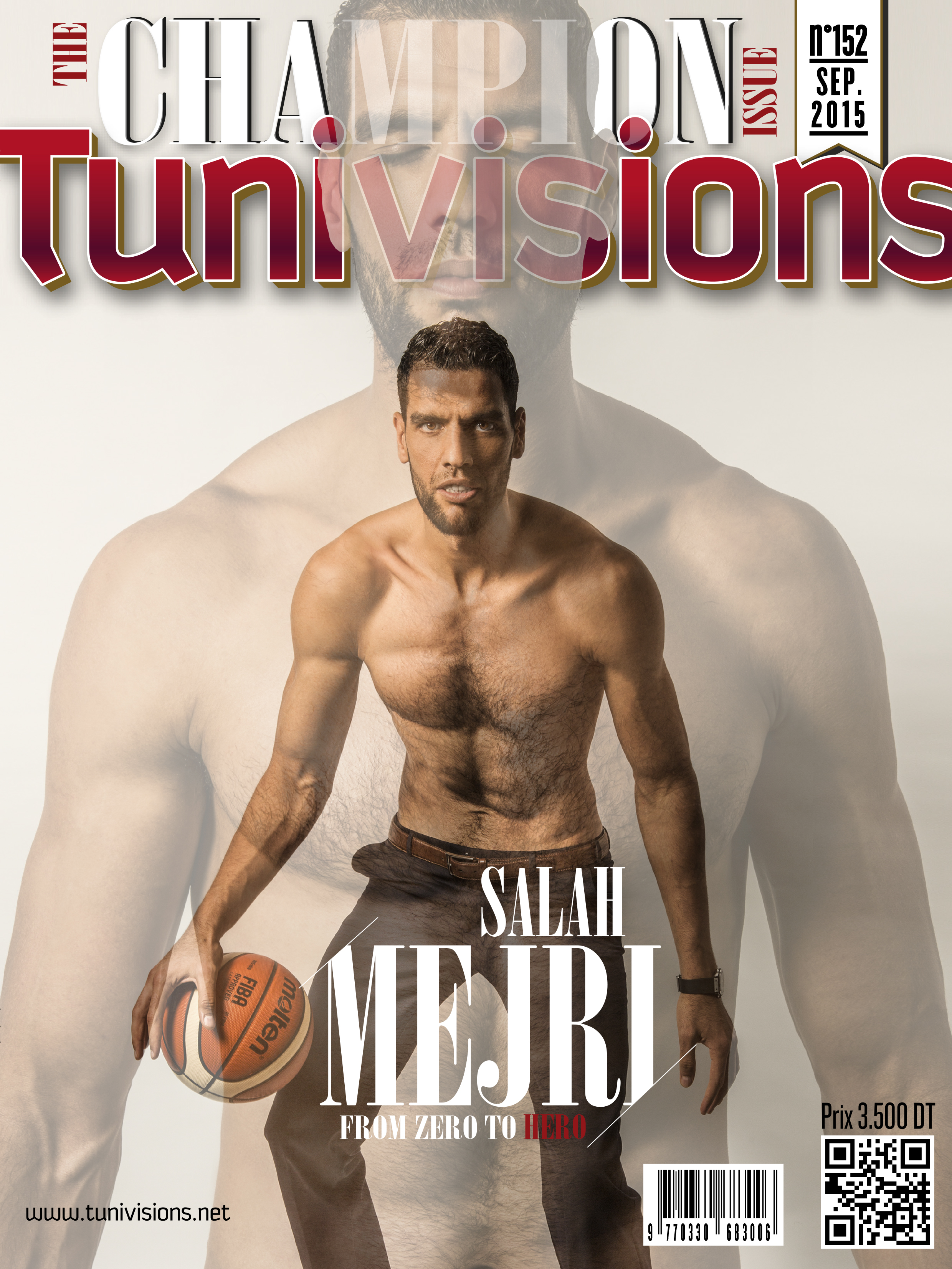 Couverture du numéro 152 du magazine tunisien Tunivisions.